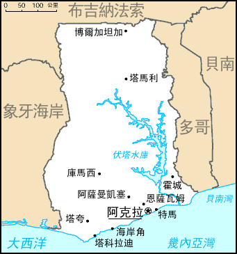 加納地圖。